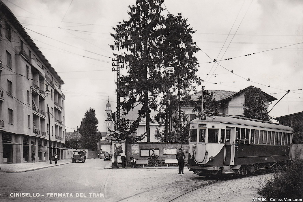 Cartolina illustrata di Cinisello Balsamo, raffigurante il capolinea della tranvia per Milano. È in sosta la motrice n. 60, appartenente alla serie 60 ÷ 69.